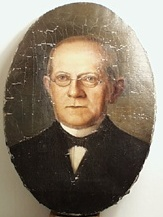 Portrætmaleri af Michael Vogelius som har hængt i sønnen Johannes Vogelius' dagligstue.